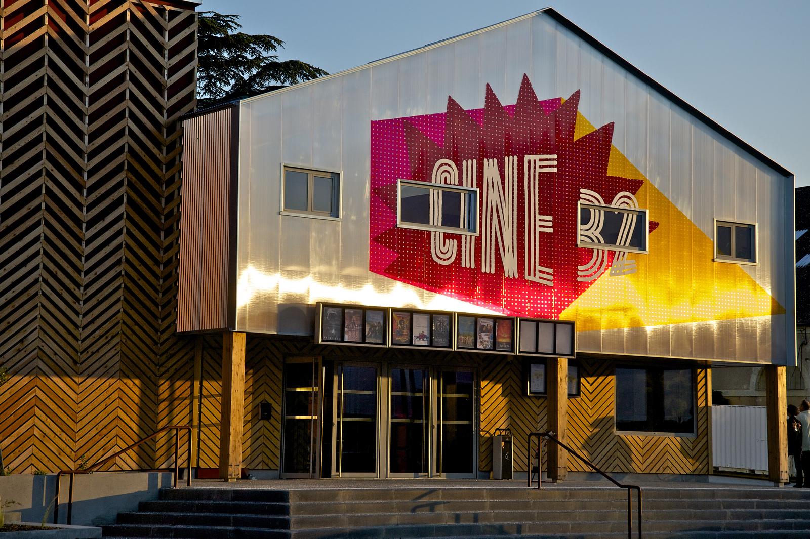 Entrée du 'Ciné 32' à Auch (Gers, France).